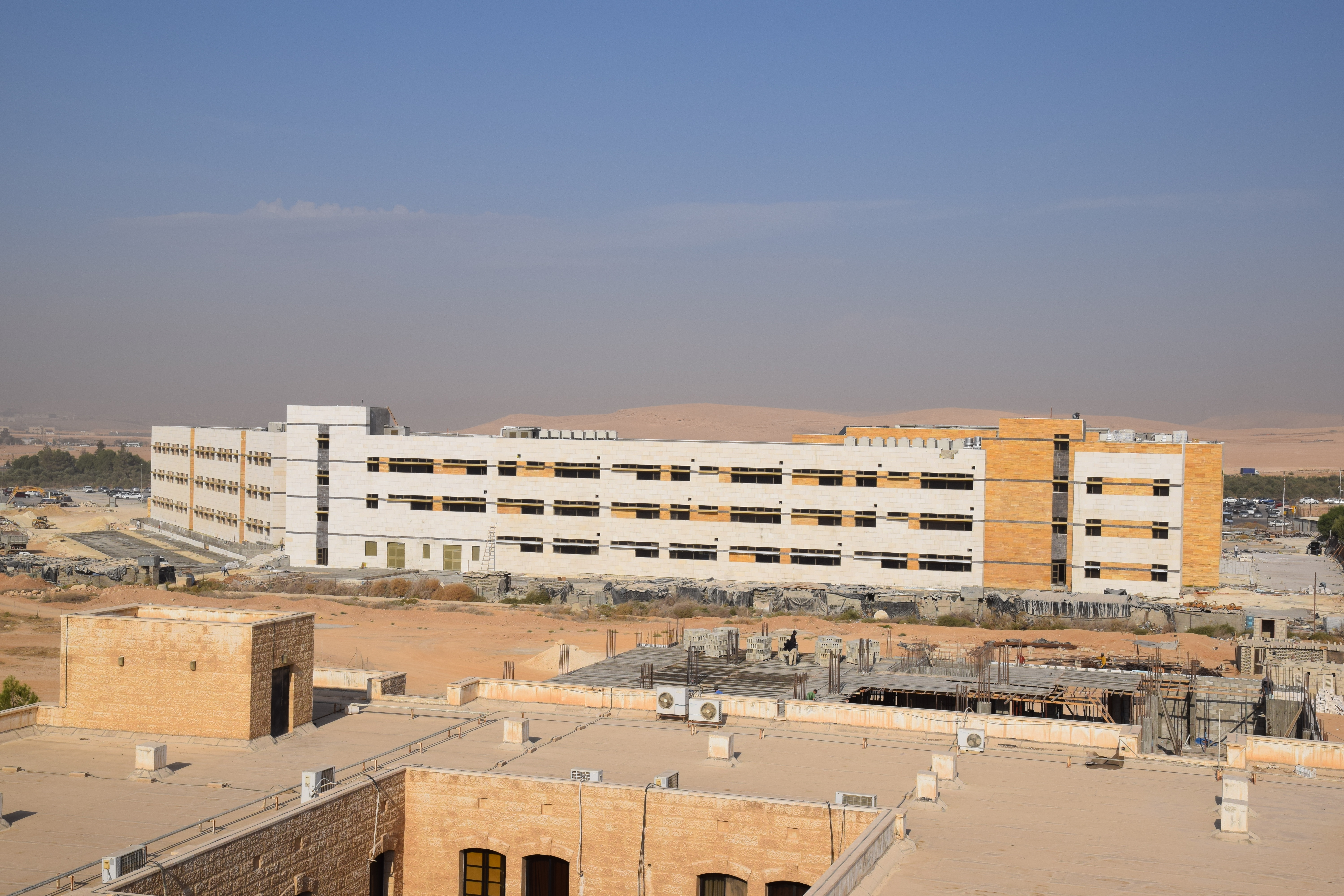 الهاشمية